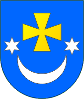 Історичний герб Комишні(1715)